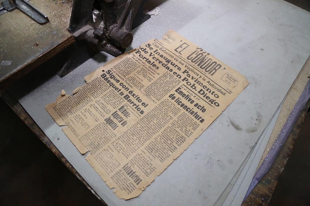 OHiggins: Intendente @juanmasferrer visita el Diario "El Cóndor" de #SantaCruz, tradicional medio escrito que desde el año 1917 informa a esta comuna y la provincia de #Colchagua. ChileLoHacemosTodos @ Santa Cruz, Chile